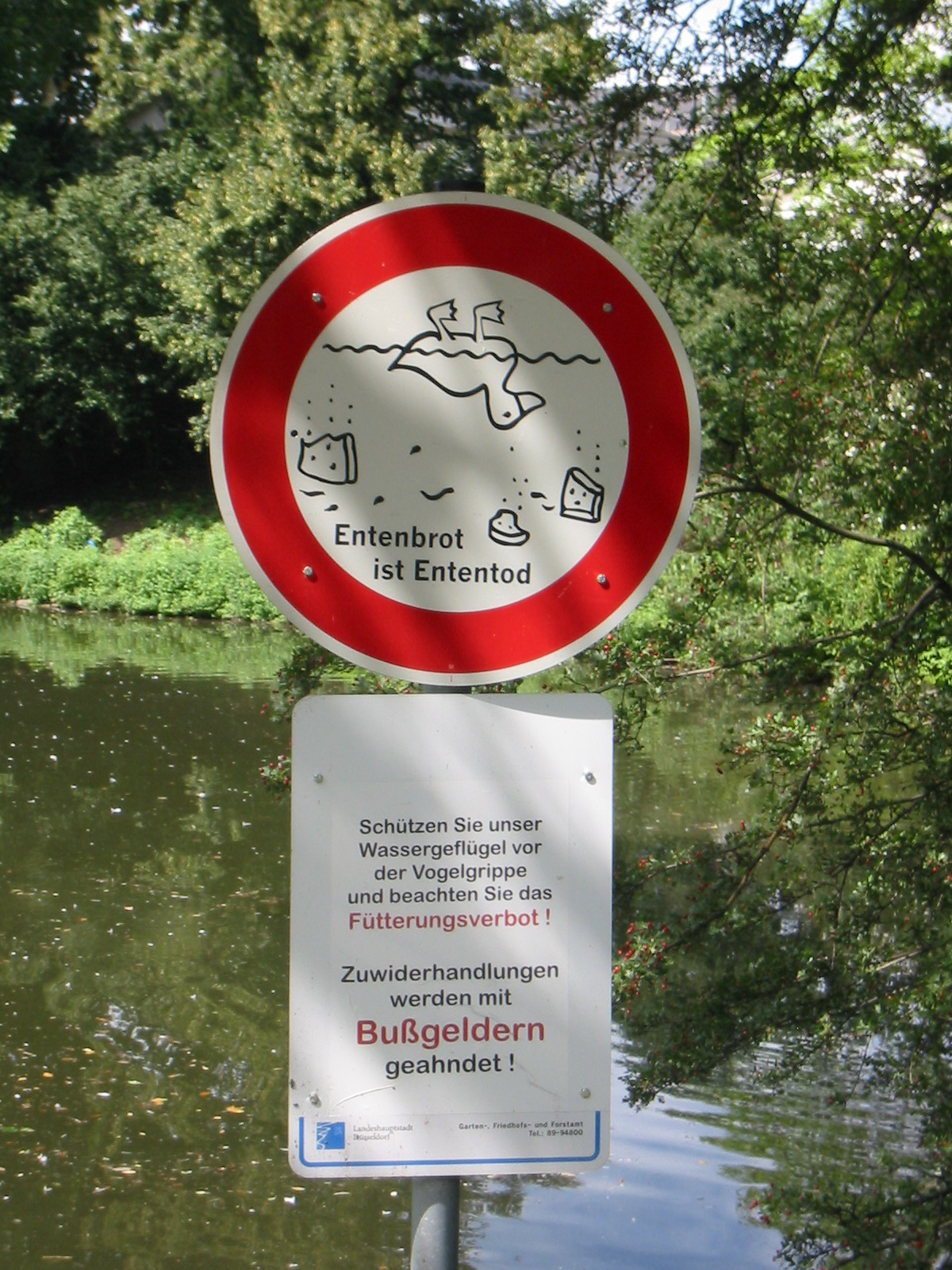 Entenbrot ist Ententod Author: Witoki Legend: Sign forbidding to feed the birds in a park, because of bird flu risk Place: Düsseldorf, Germany Date: August 2006